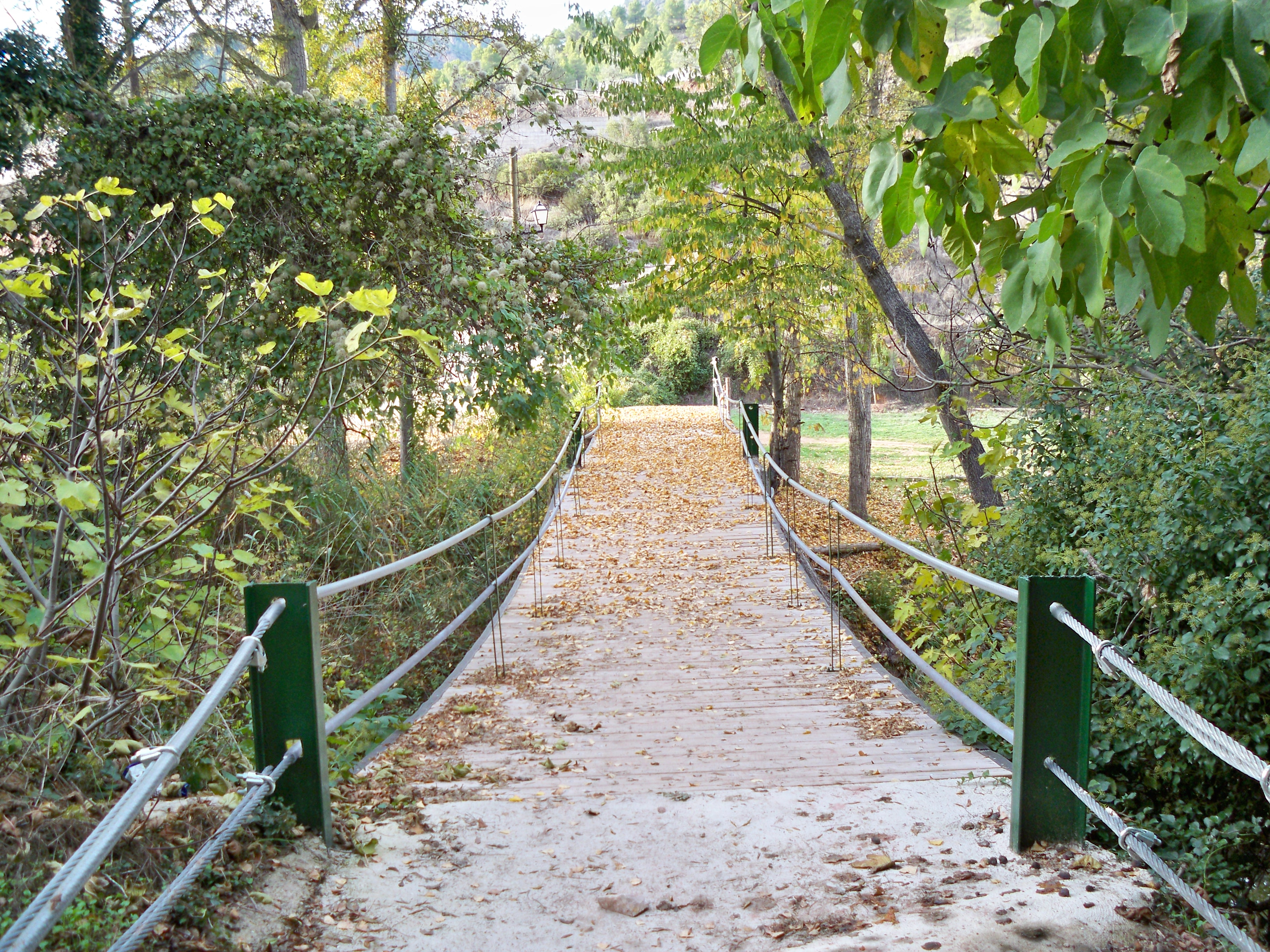 Fotografía del puente sobre el río Mundo en Los Alejos (Molinicos- Albacete)